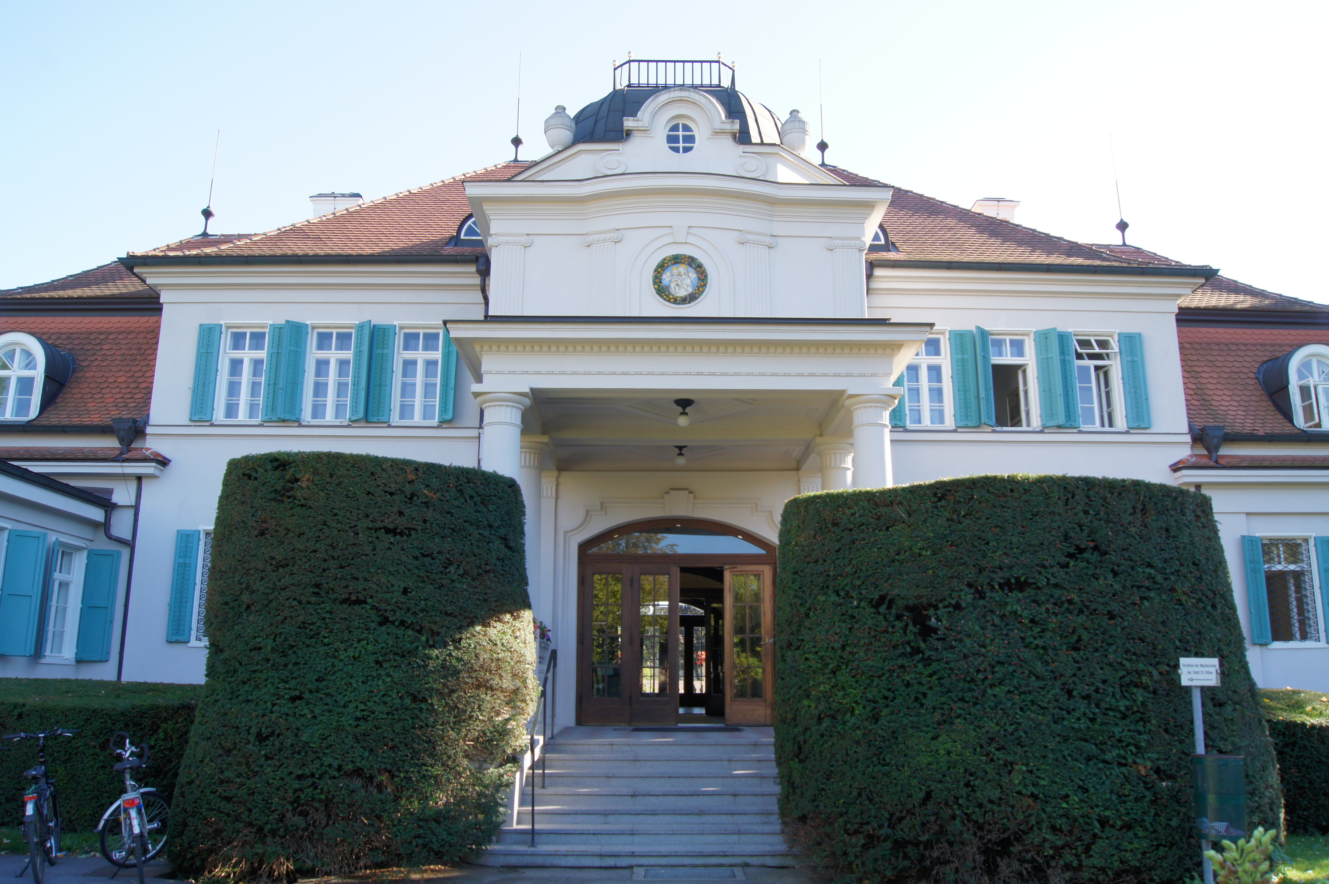 Ehemalige Voithvilla, Haupteingang